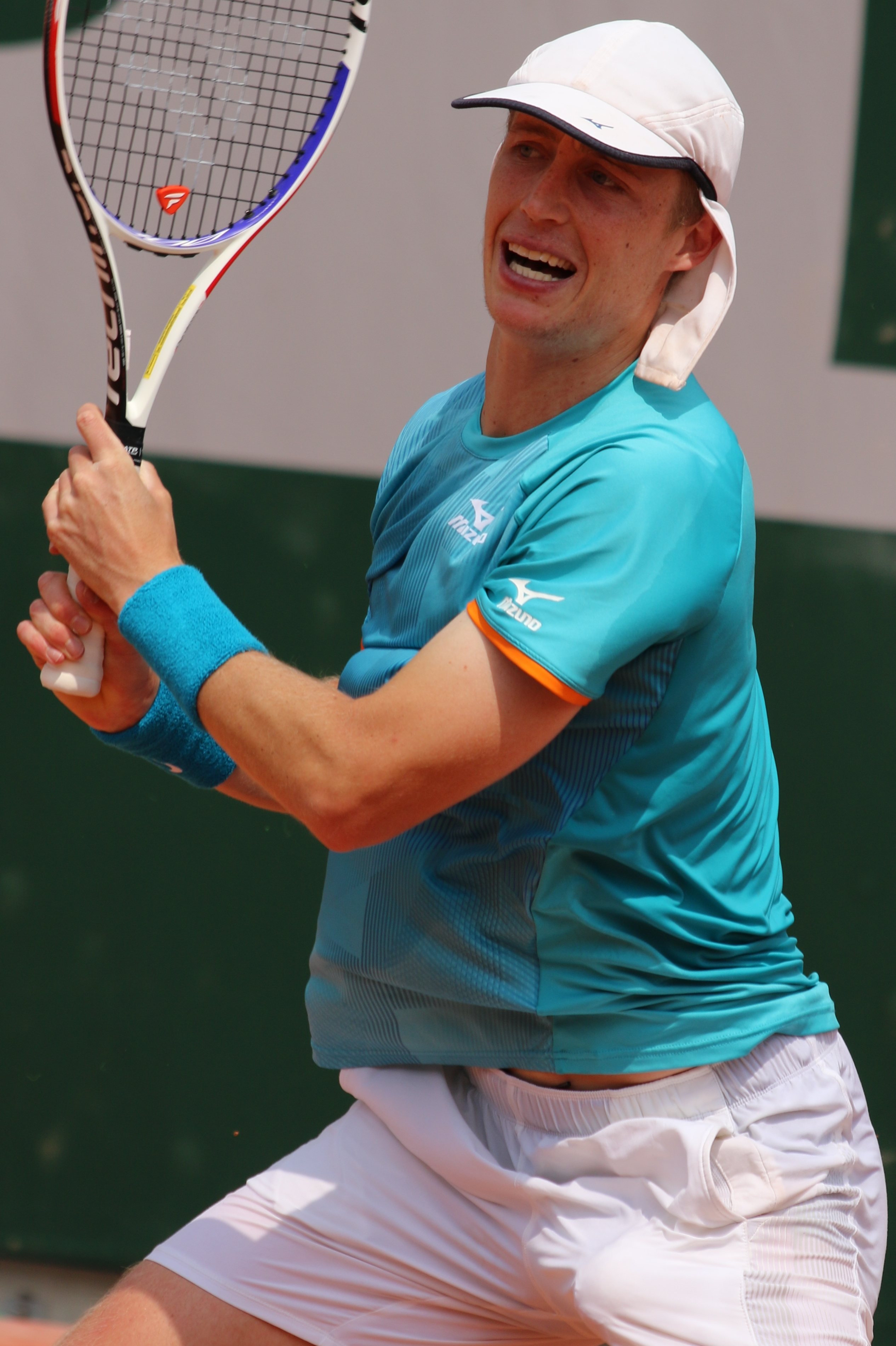 Polmans RGQ19 (18)